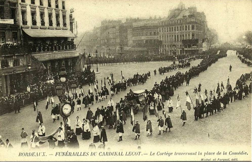 Funérailles du Cardinal Lécot